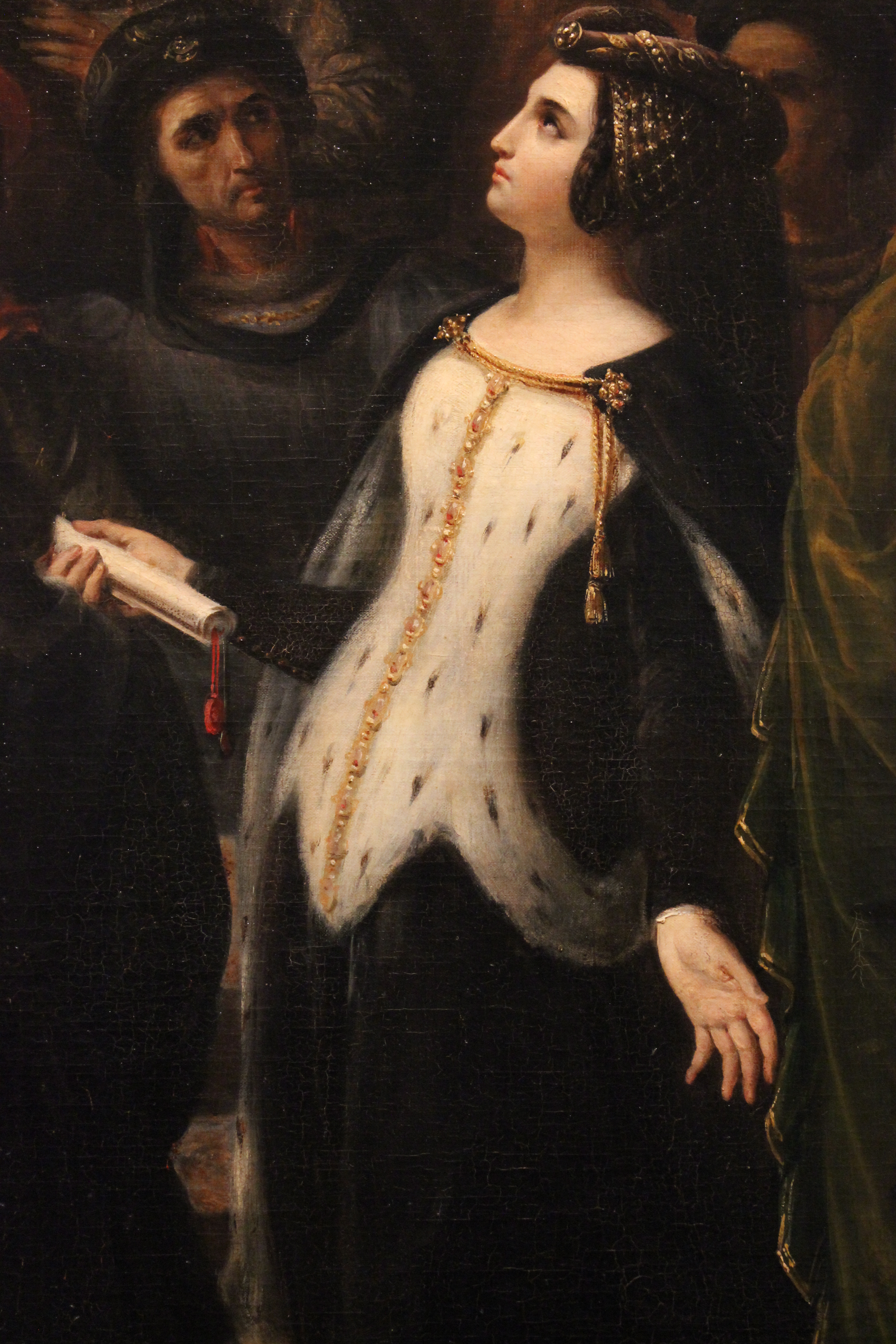 Valentine de Milan implore la justice du roi Charles VI pour l'assassinat du duc d'Orléans, tableau d'Alexandre Colin en 1836, exposé au Musée des beaux-arts de Lyon en 2014.